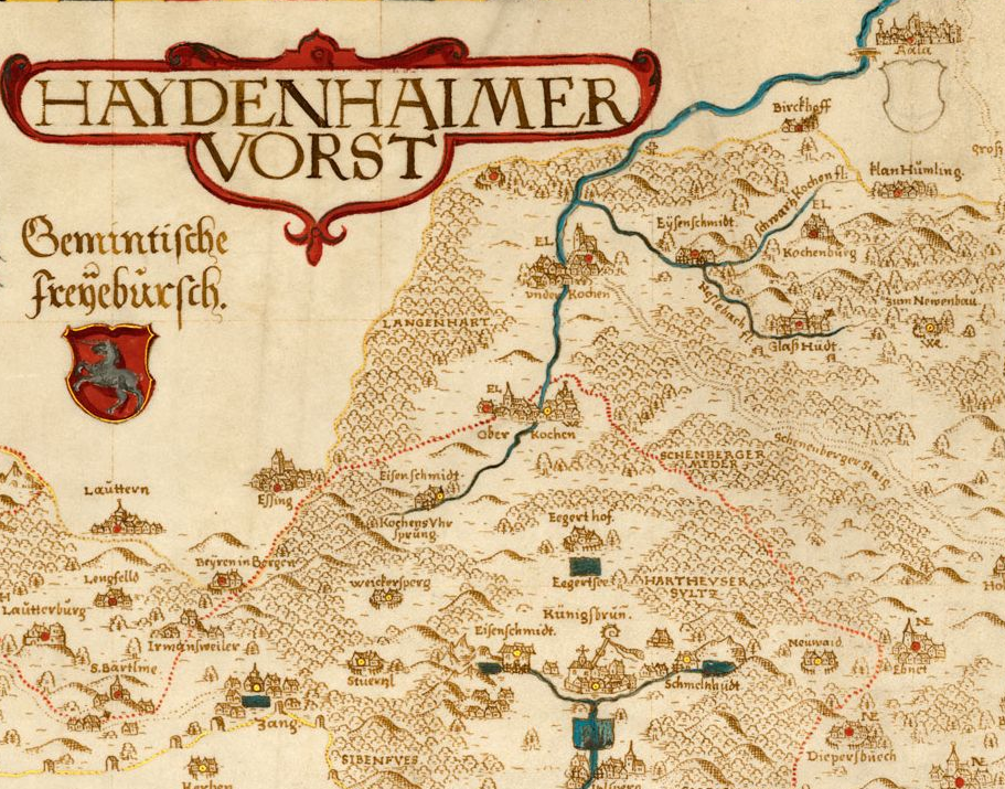 Oberkochen in: Chorographia Beschreibung des löblichen Fürstentums Württemberg (1590), Blatt 13 v: Heidenheimer Forst (Ausschnitt)